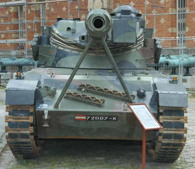 Jagdpanzer Kürassier vor dem Heeresgeschichtlichen Museum Wien